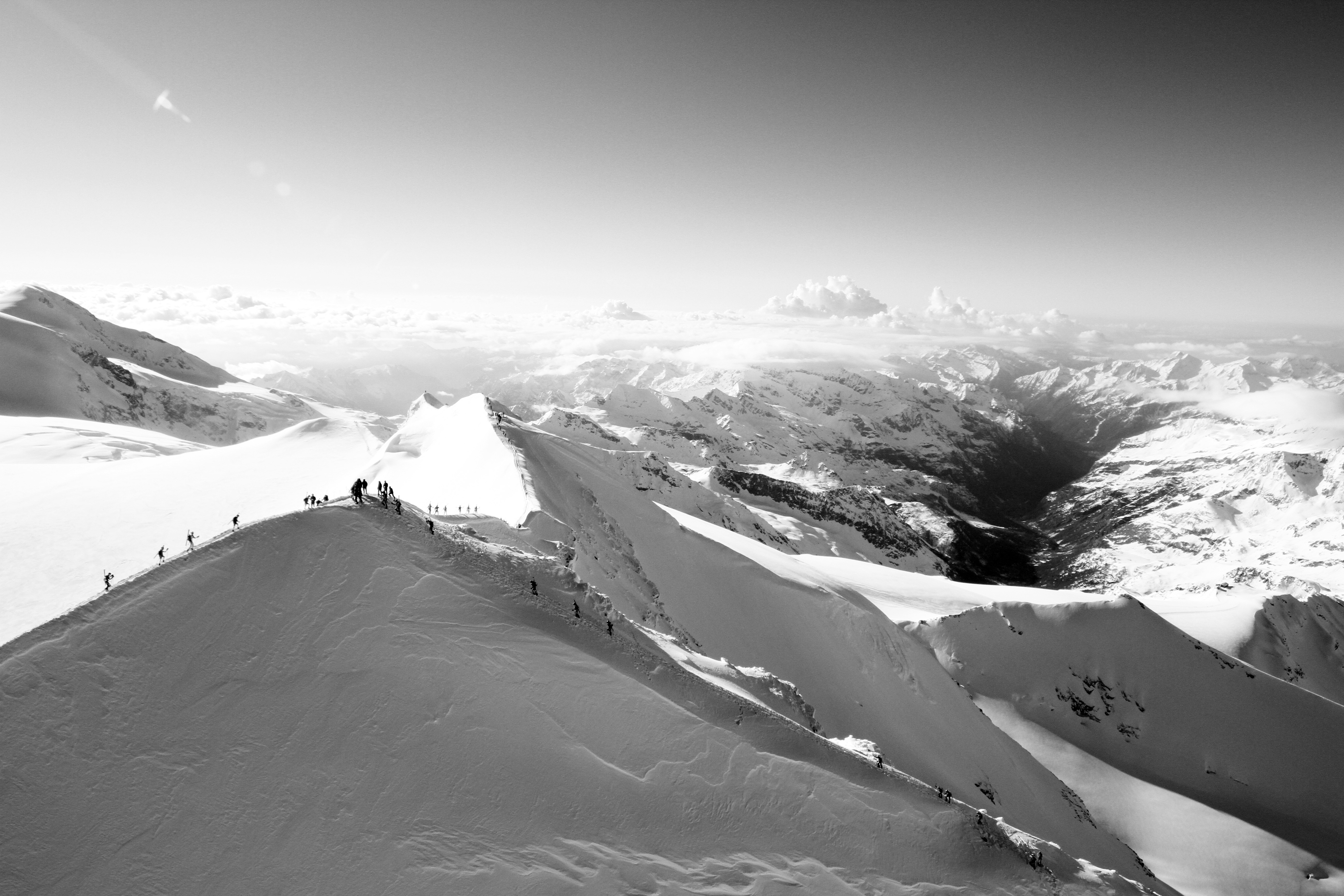 Castore This is a photo of a monument which is part of cultural heritage of Italy.